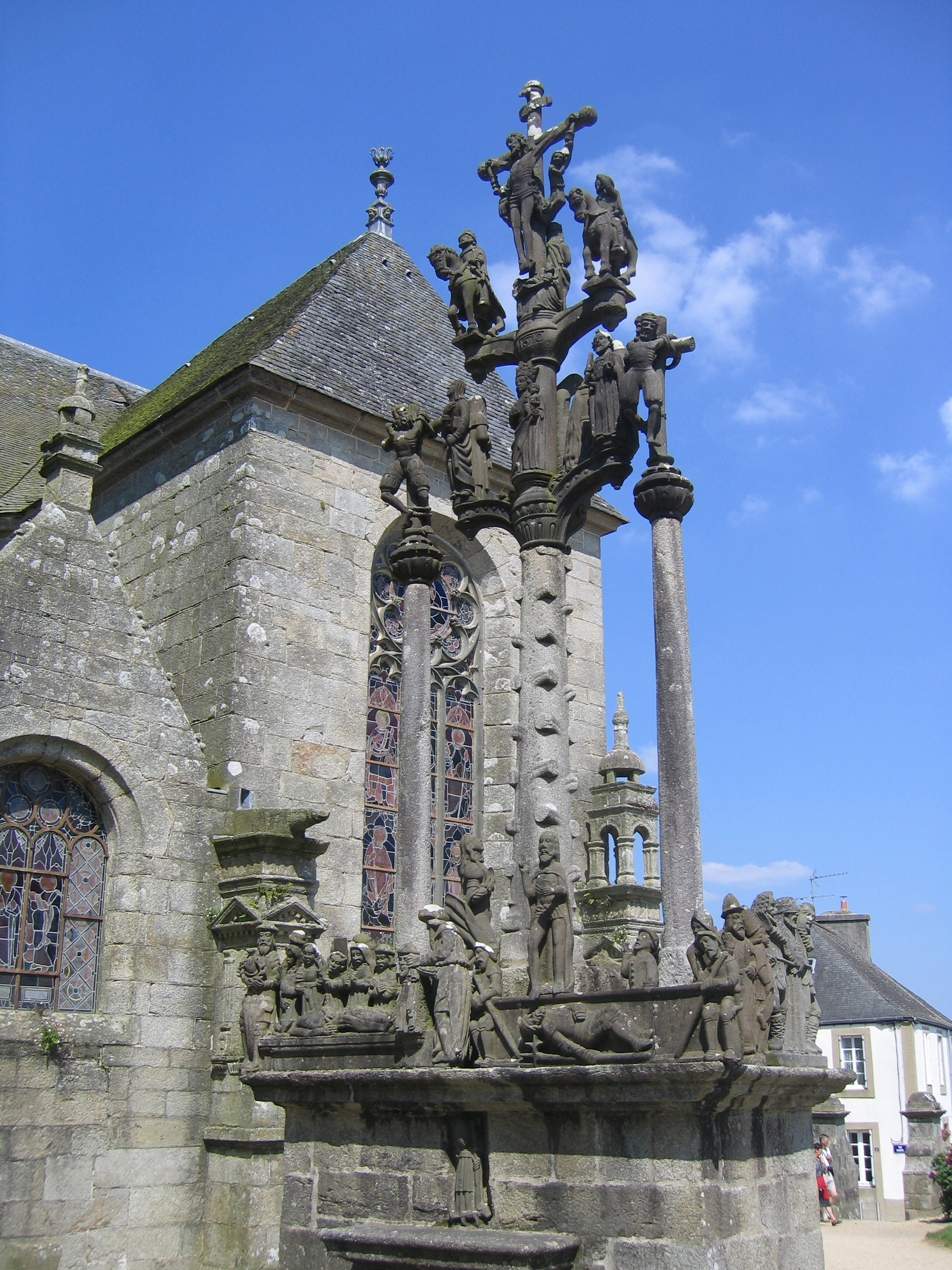 Calvaire de l'enclos paroissial de Saint-Thégonnec